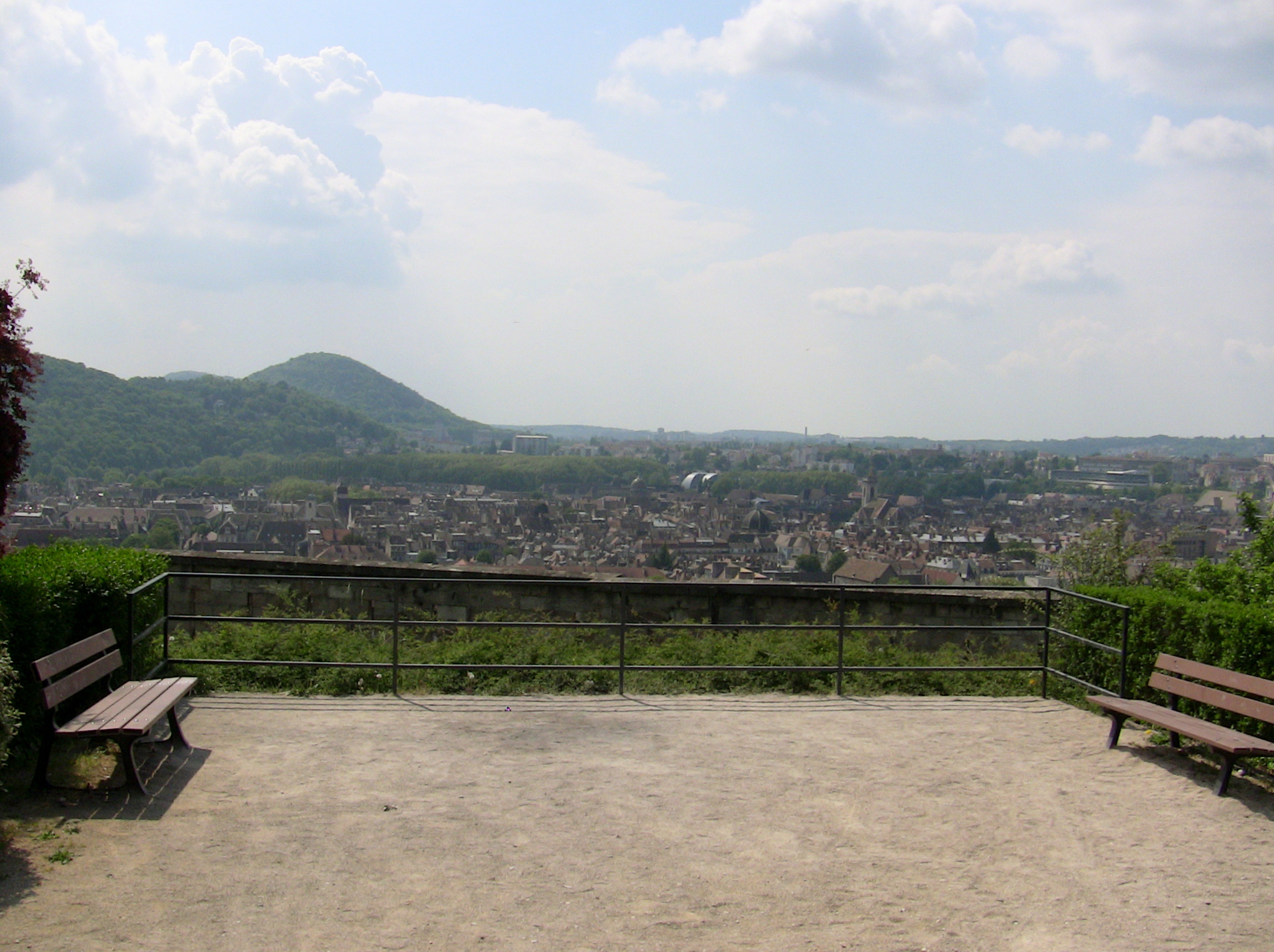 Panorama sur la ville de Besançon (Doubs, France) depuis le fort de Beauregard.